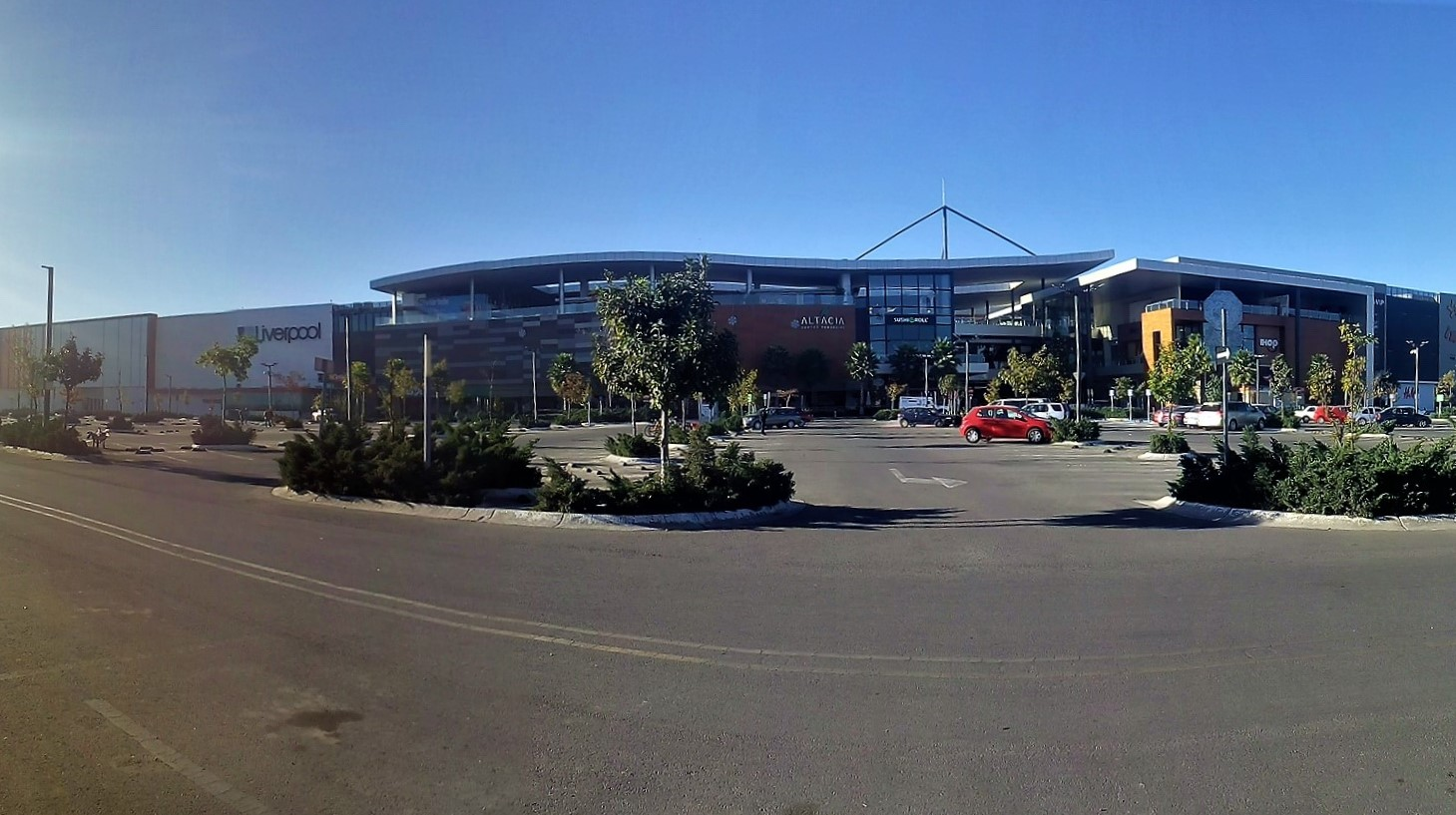 Plaza Altacia